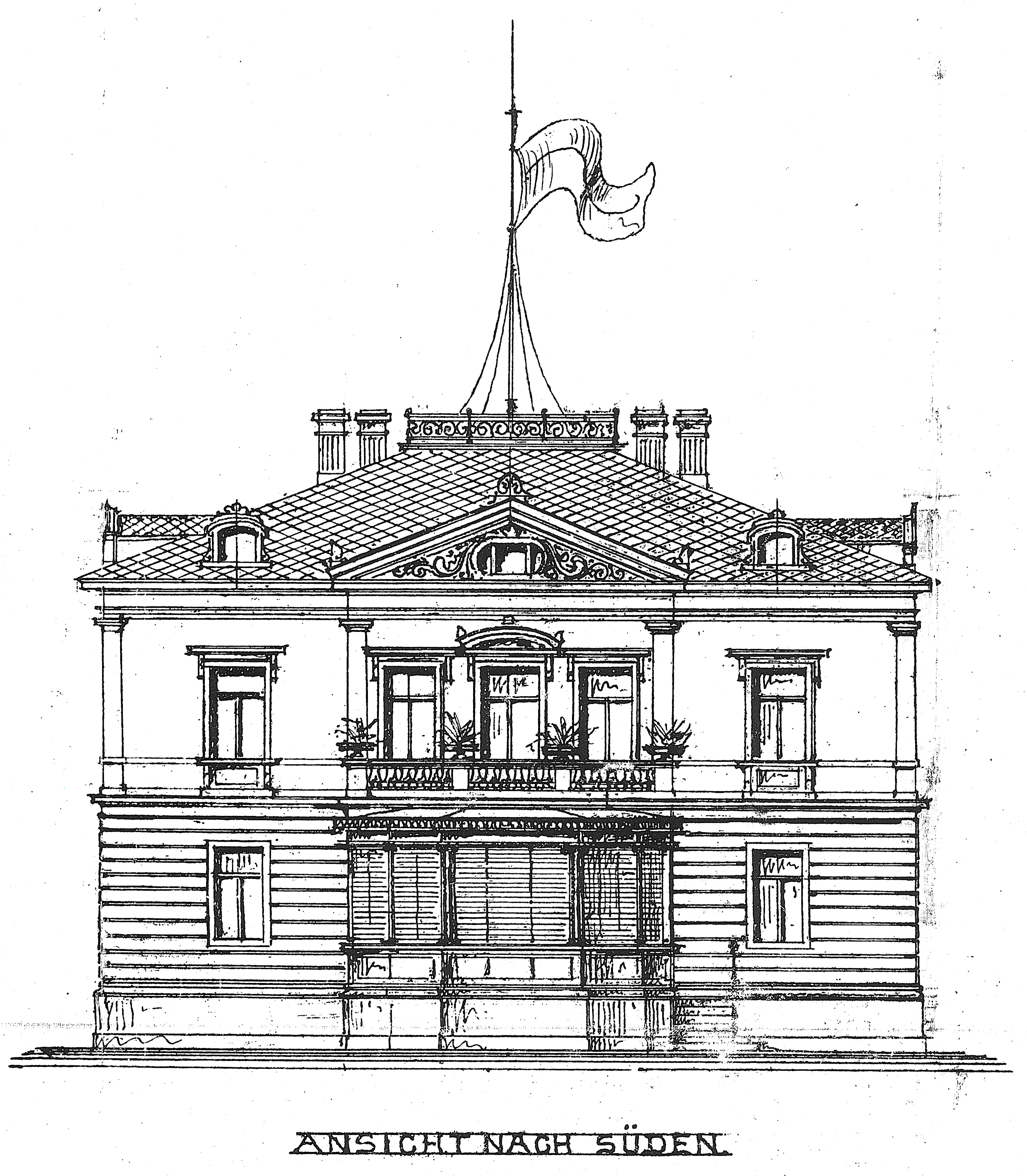 Radebeul, Villa Tanger: Umbau-Entwurf von Paul Ziller, 1911, Südseite